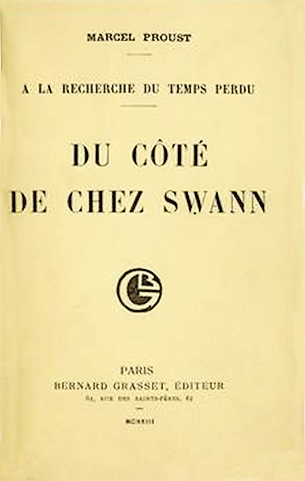 Du coté de chez Swann, première édition à compte d'auteur chez Bernard Grasset, 1913